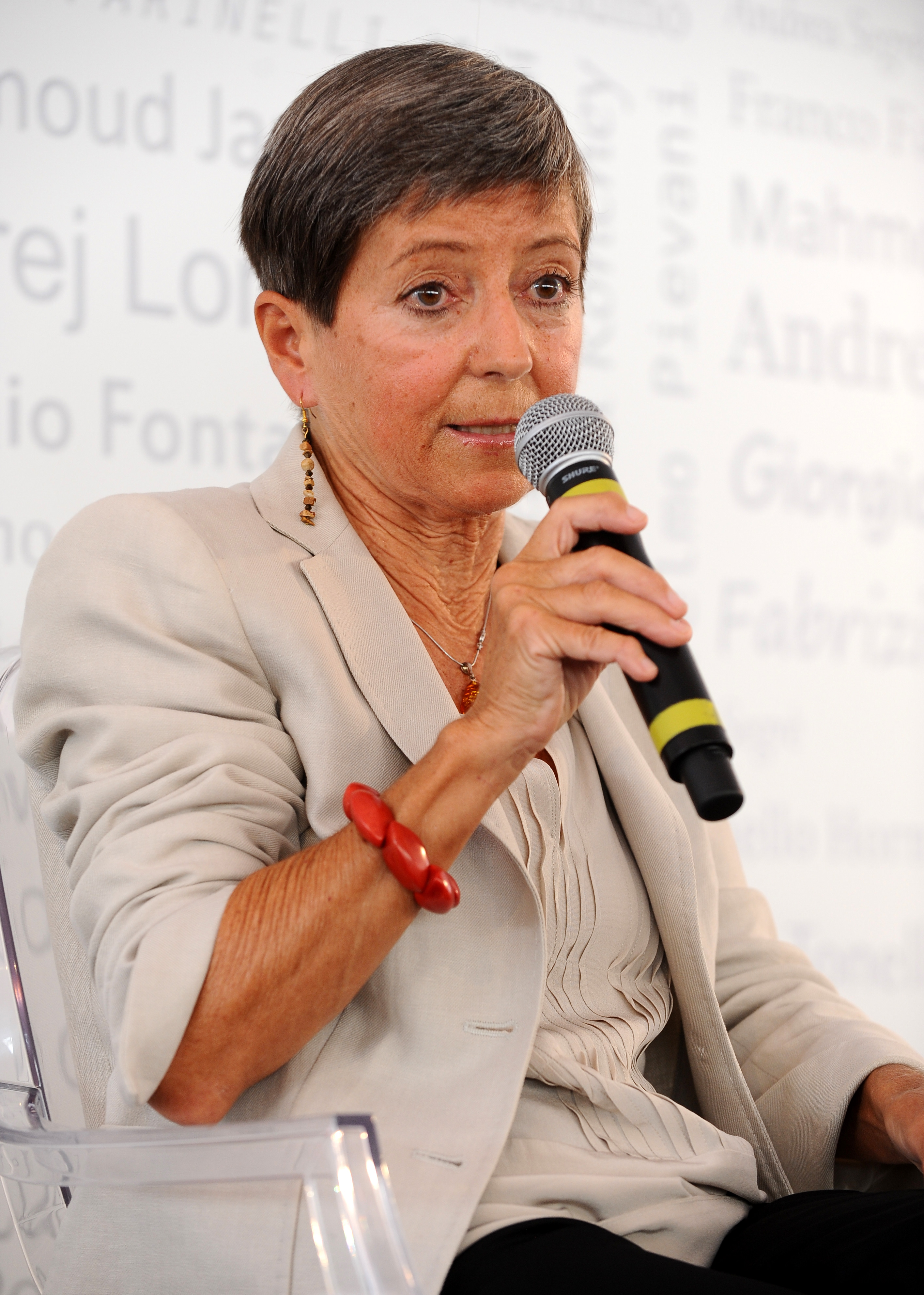 Laura Boella a Mantova per il Festivaletteratura 2012.